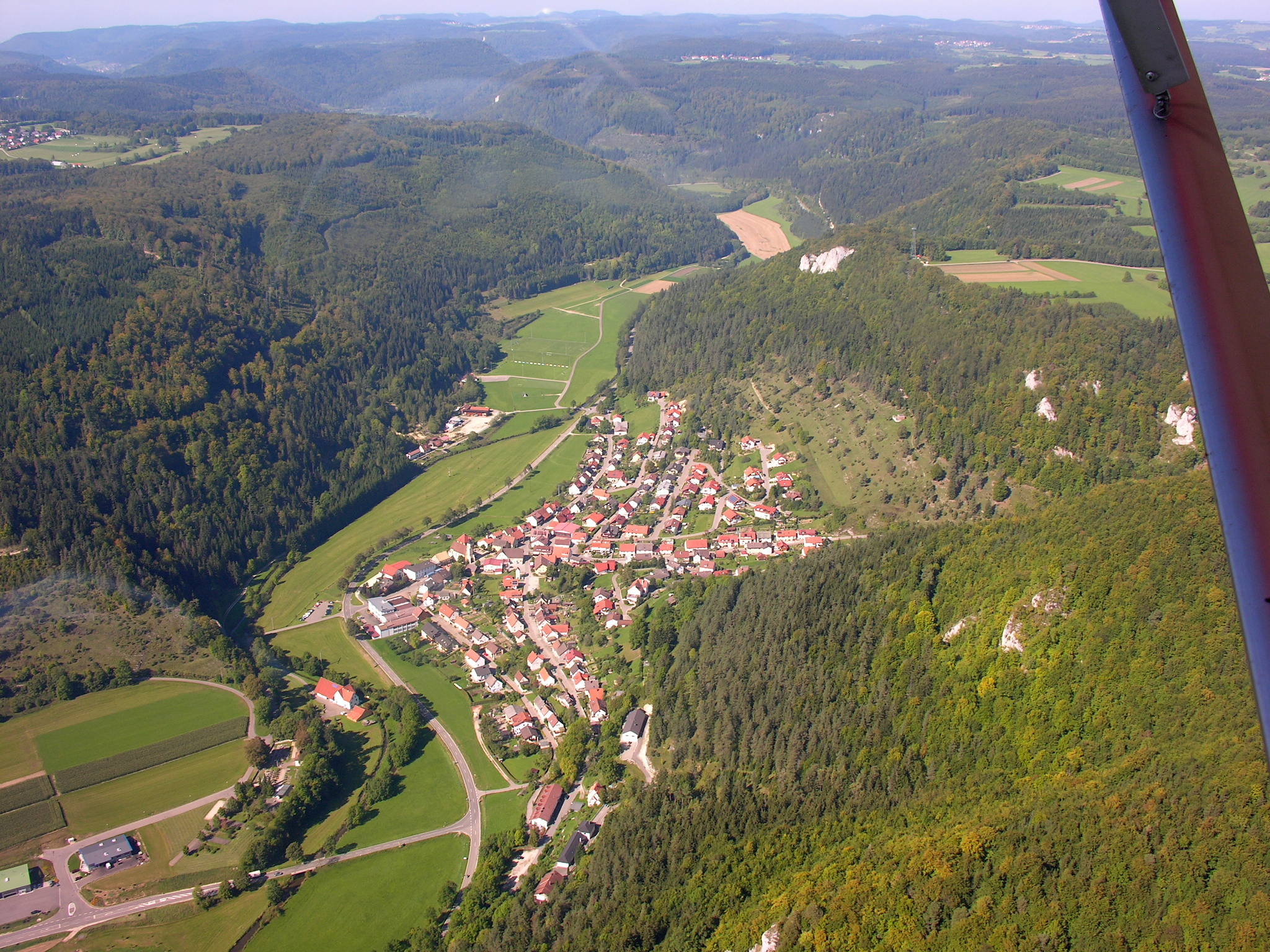 Germany, Baden-Württemberg, Bärenthal, am Horizont der Plettenberg